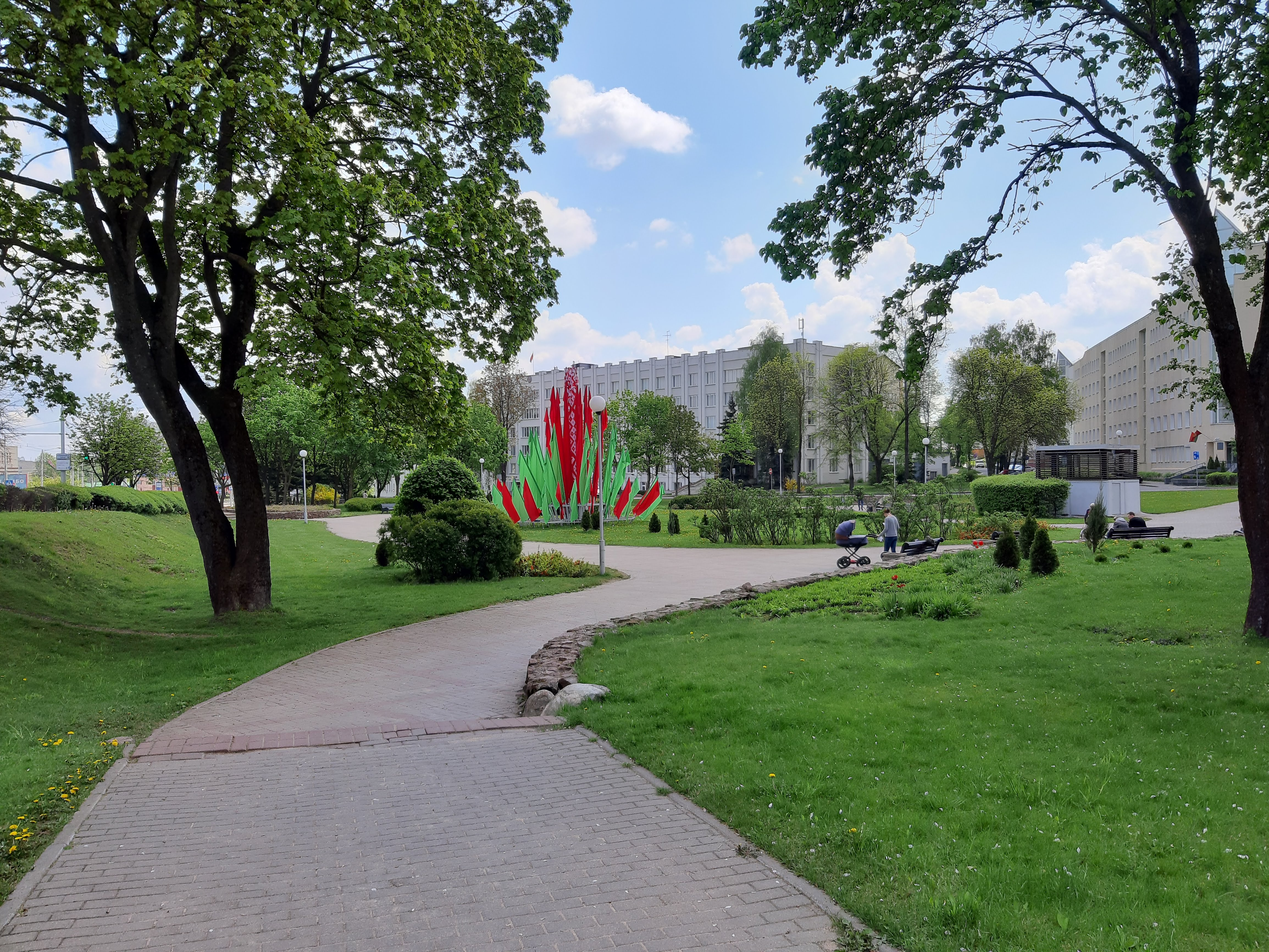 Мінск. Кальварыйскі сквер у 2019